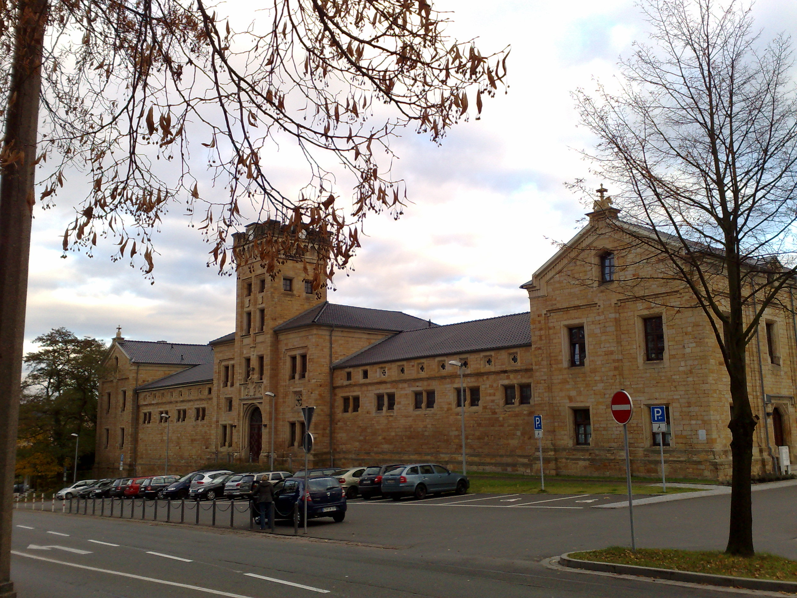 Der Marstall in Gotha